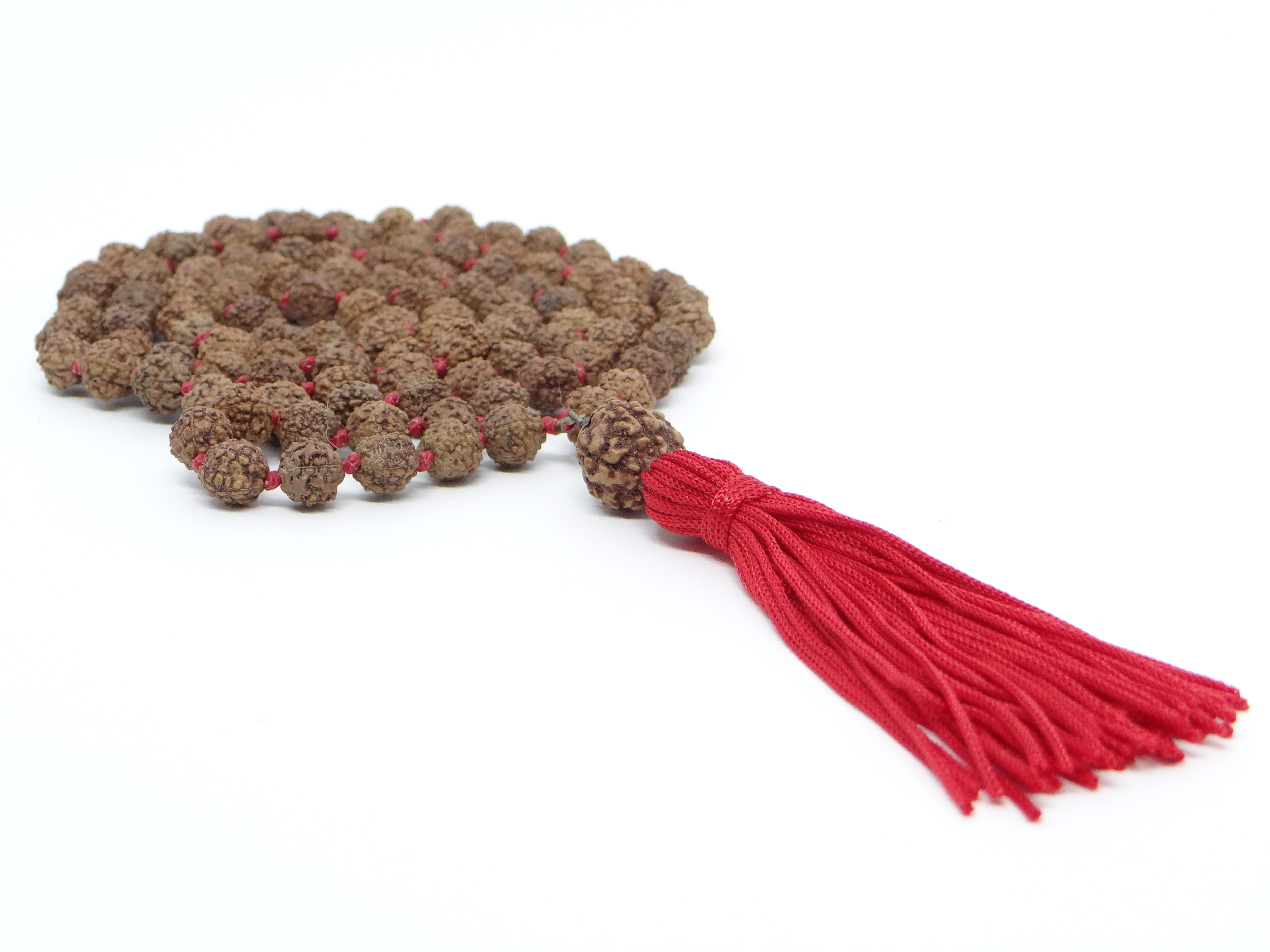 Usadas milenarmente em tradições orientais desde os povos védicos, as sementes de rudraksha são muito usadas na confecção e japamalas, os famosos rosários hindus